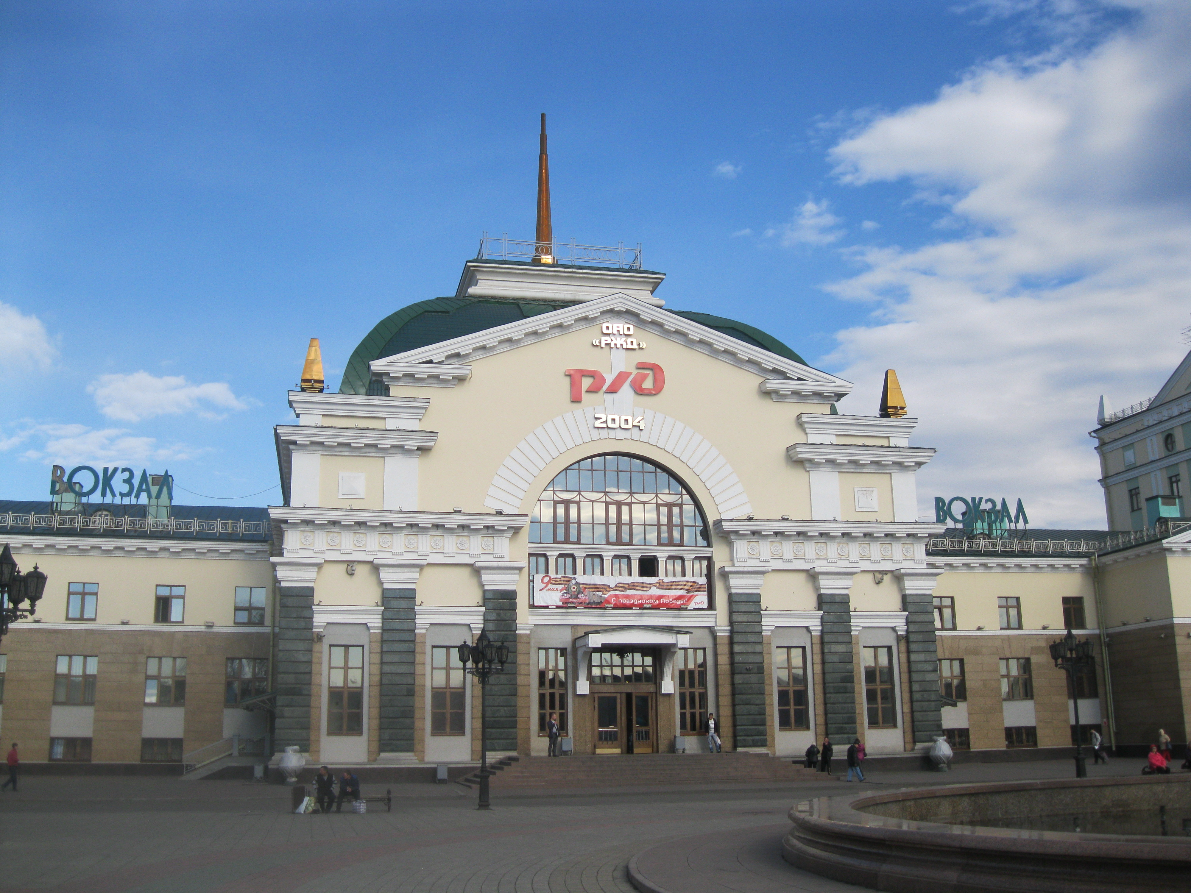 Вокзал железнодорожный (Красноярский край, Красноярск, Привокзальная площадь)